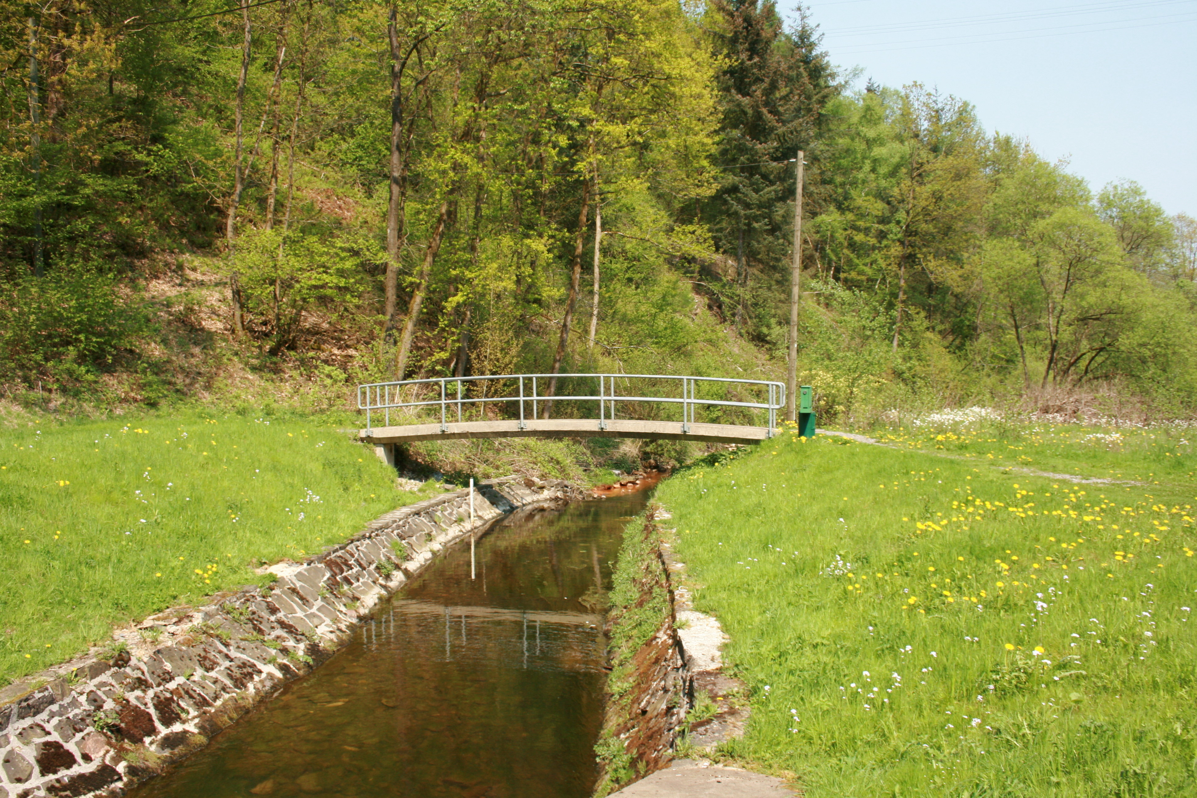 Die Oester unterhalb der Oestertalsperre in Plettenberg